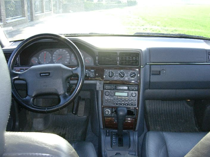 Innenraum eines Volvo 960 Typ II